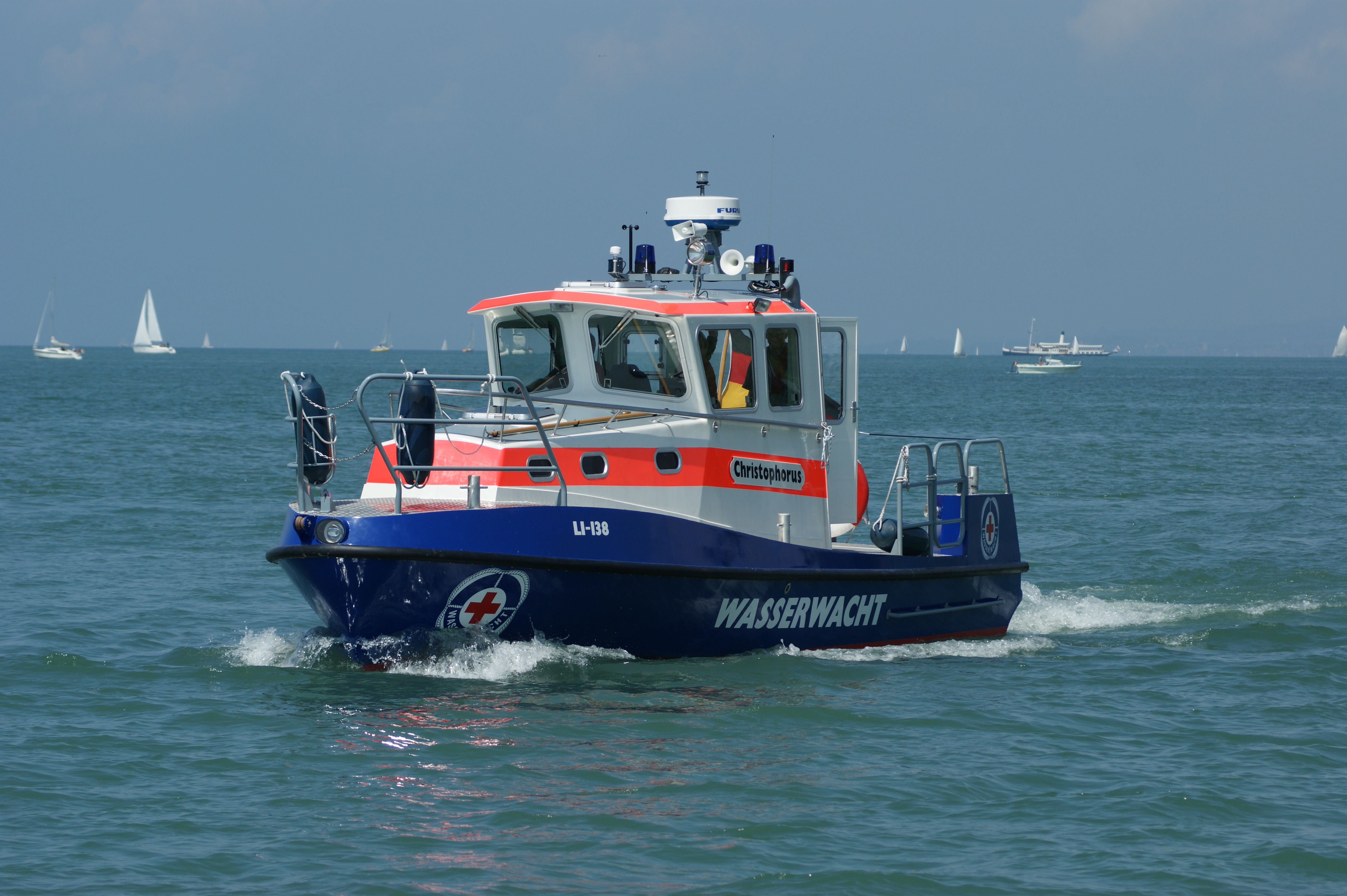 MS "Christophorus" LI-138, Seennotrettungsschiff der Wasserwacht am Bodensee